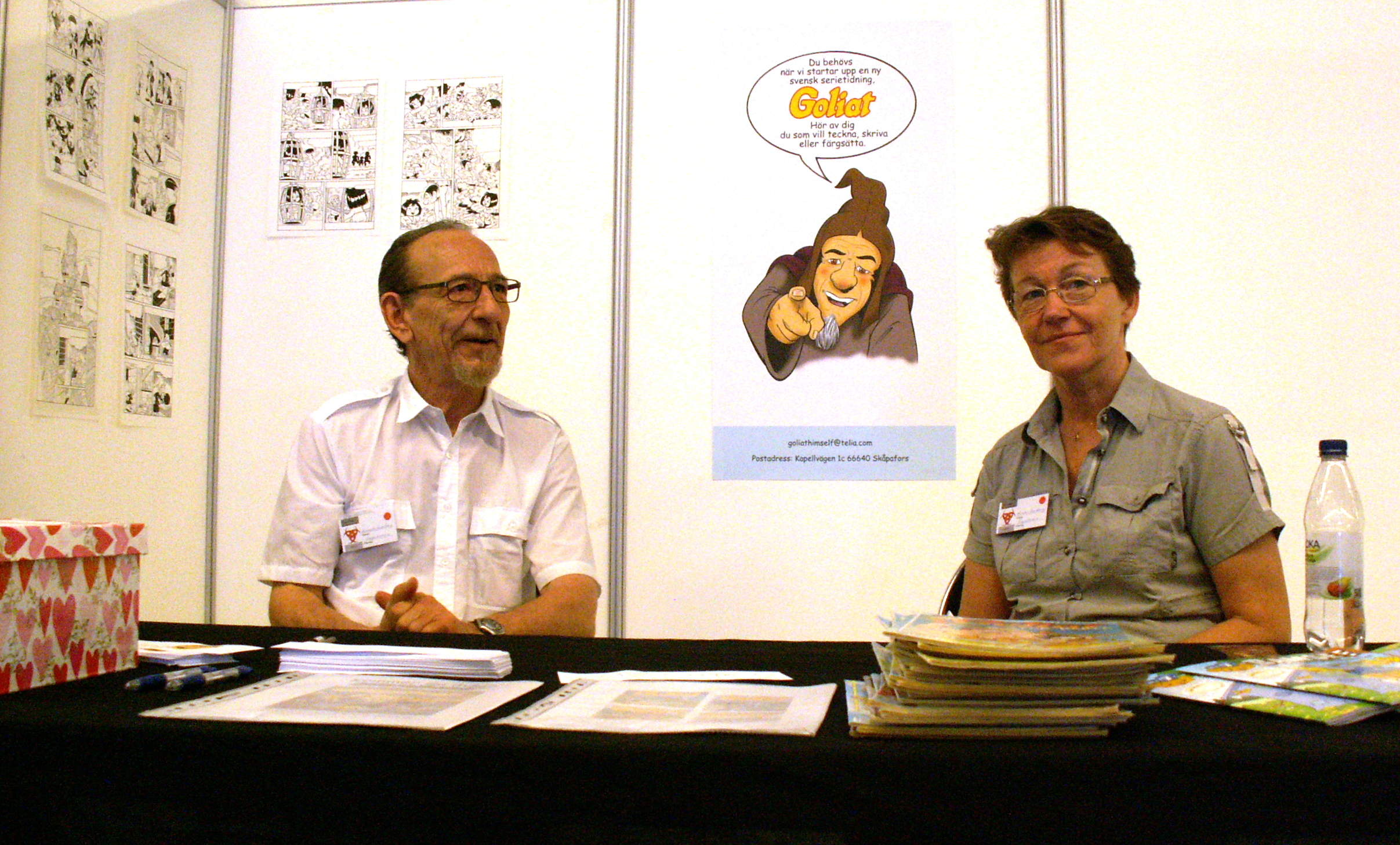 Kenneth och Kerstin Hamberg, på seriefestivalen Carlstad Comic Con maj 2012. Duon har sedan 1970-talet arbetat med den tecknade serien Goliat samt på senare år även med Bamse.